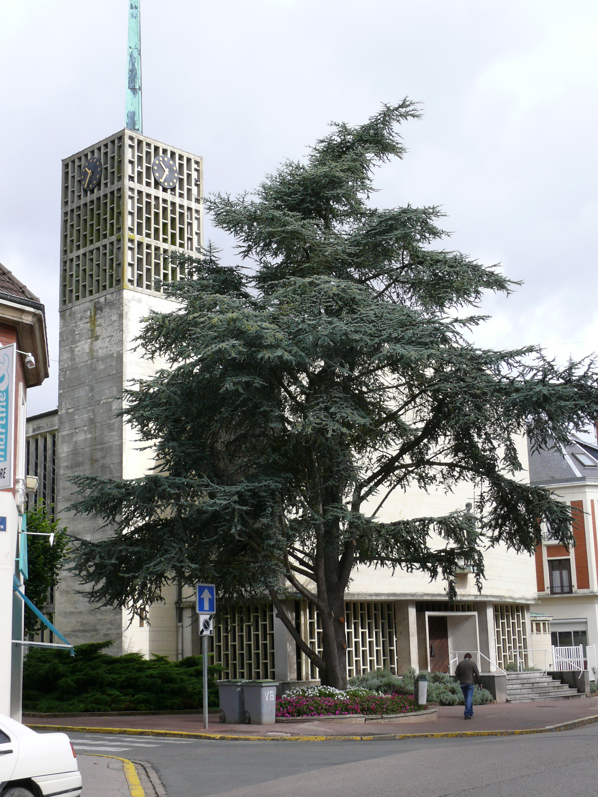 L'église moderne de Breteuil (Oise - Picardie - France)